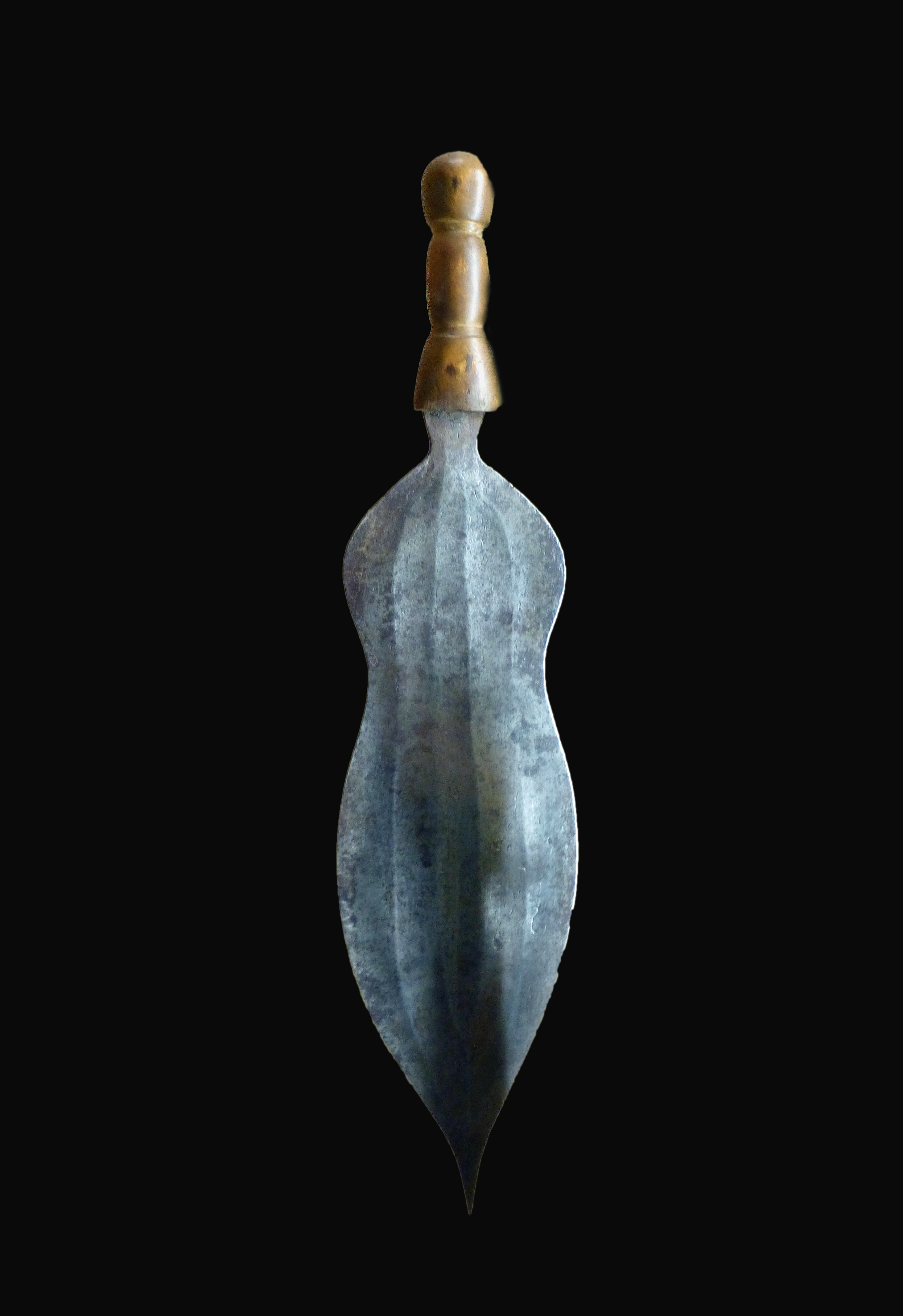 Glaive de guerre Gblé. Bakwé. Côte d'Ivoire. Début du XXe siècle. Fer et bois, 57 cm. Musée africain de Lyon.